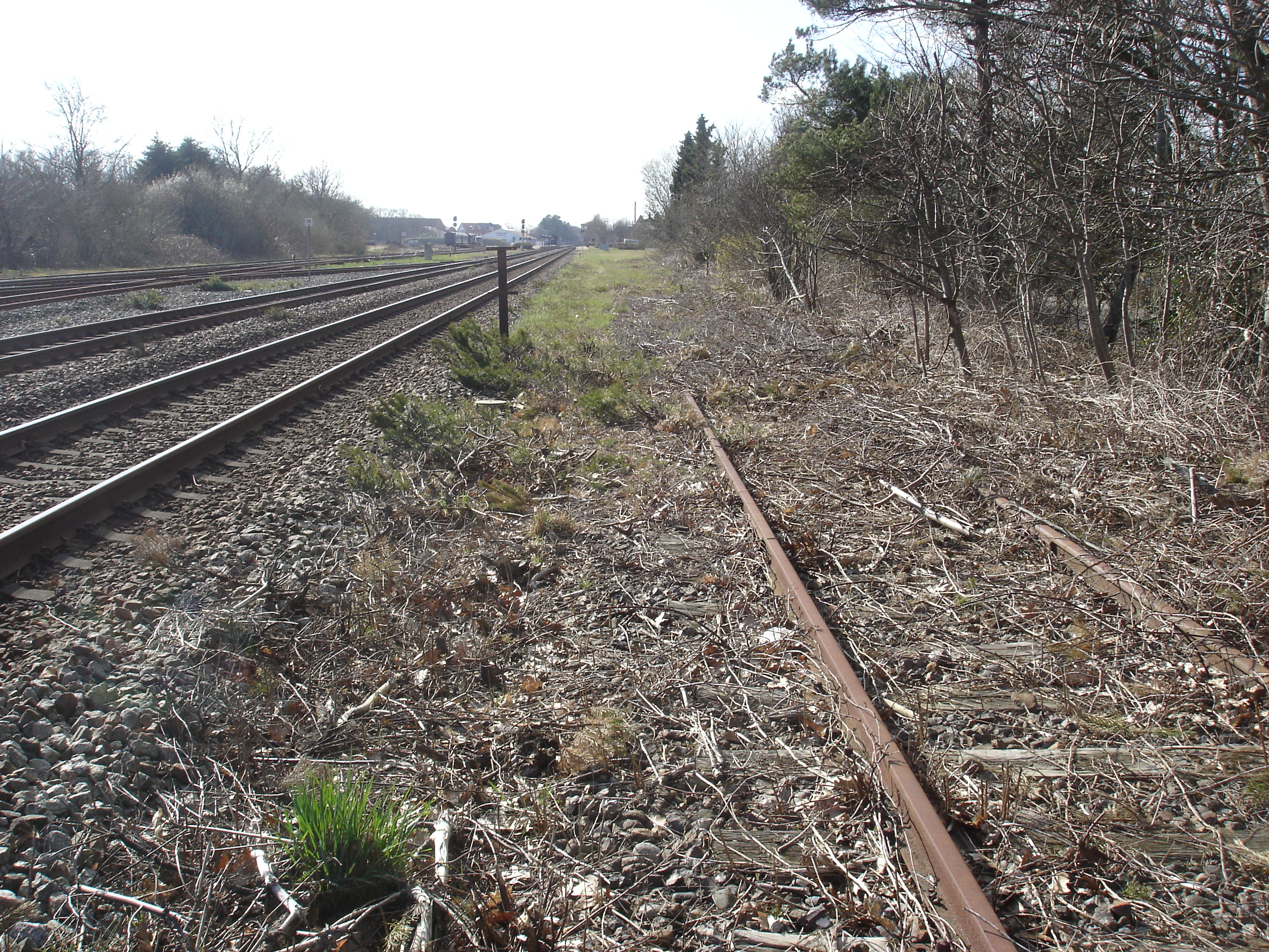 Diagonalbanens spor th. er taget op på det sidste stykke Ø for Bramming Station